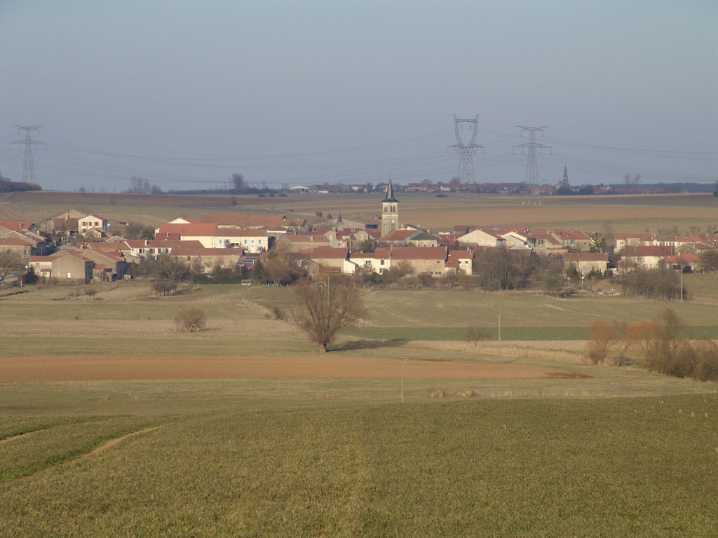 Village d'Eply vu de la route de Morville